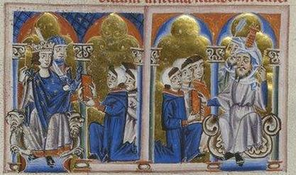 Faraj ben Salim in minature riprodotte su foto, probabile opera di Frate Giovanni di Montecassino su commissione di Carlo I d'Angiò